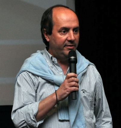 El periodista Santiago Oscar Veiga expone en Buenos Aires sobre su film, el documental "Perón y el Deporte".